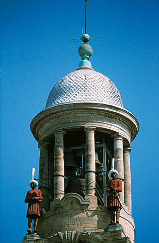 Carillon de Cambrai (59). Cliché mis à disposition par le Comité du Tourisme du Nord publiablemoyennant mention du crédit